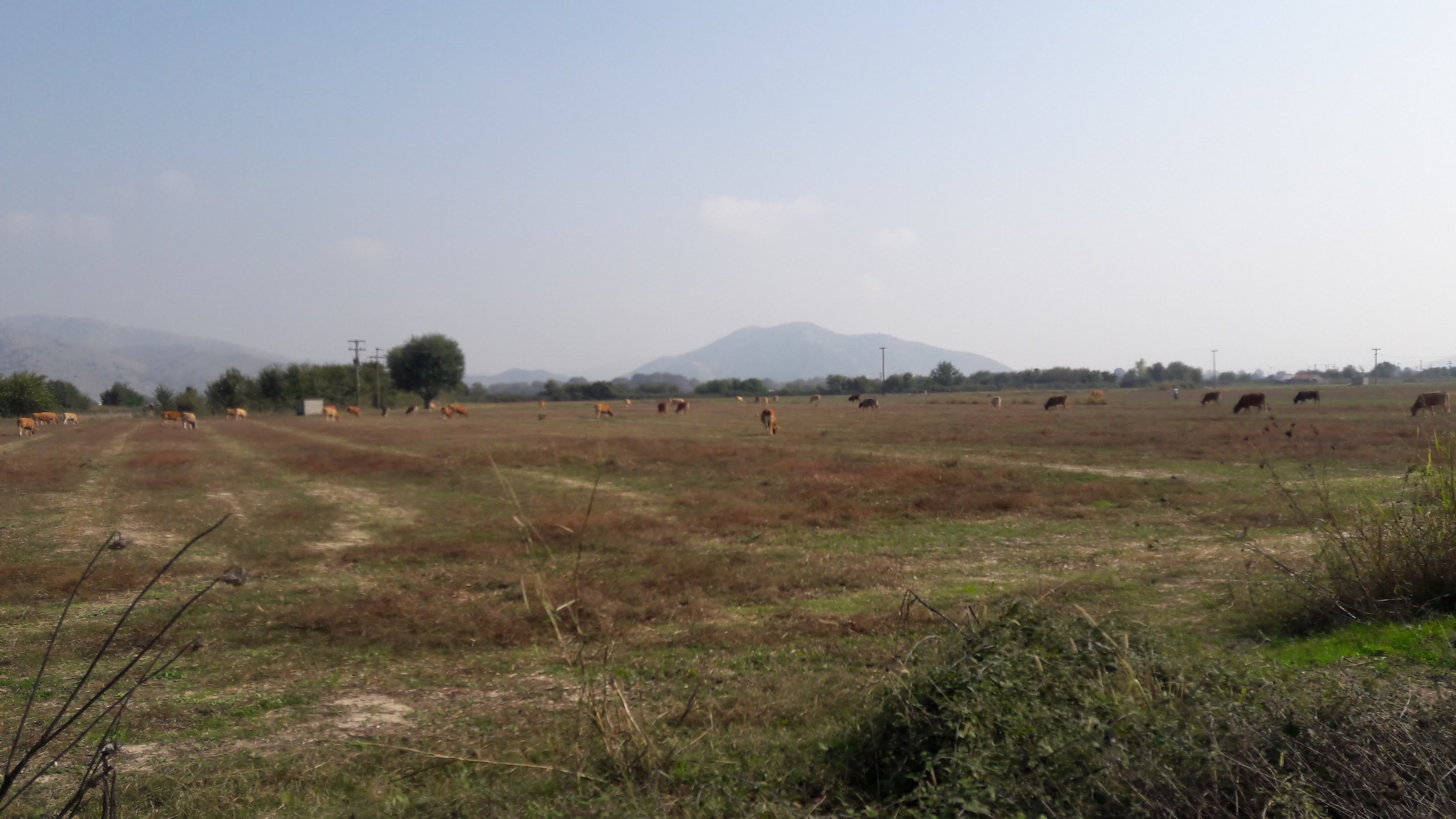 Εκτροφή βοοειδών στο Πετρωτό